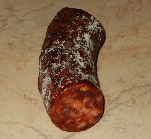 Tradycyjne chorizo z okolic Barcelony (region Katalonia).